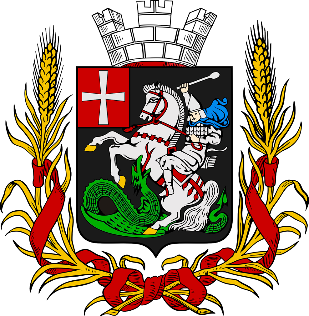 Герб Владимира-Волынского, утвержденный 27 января 1911 года